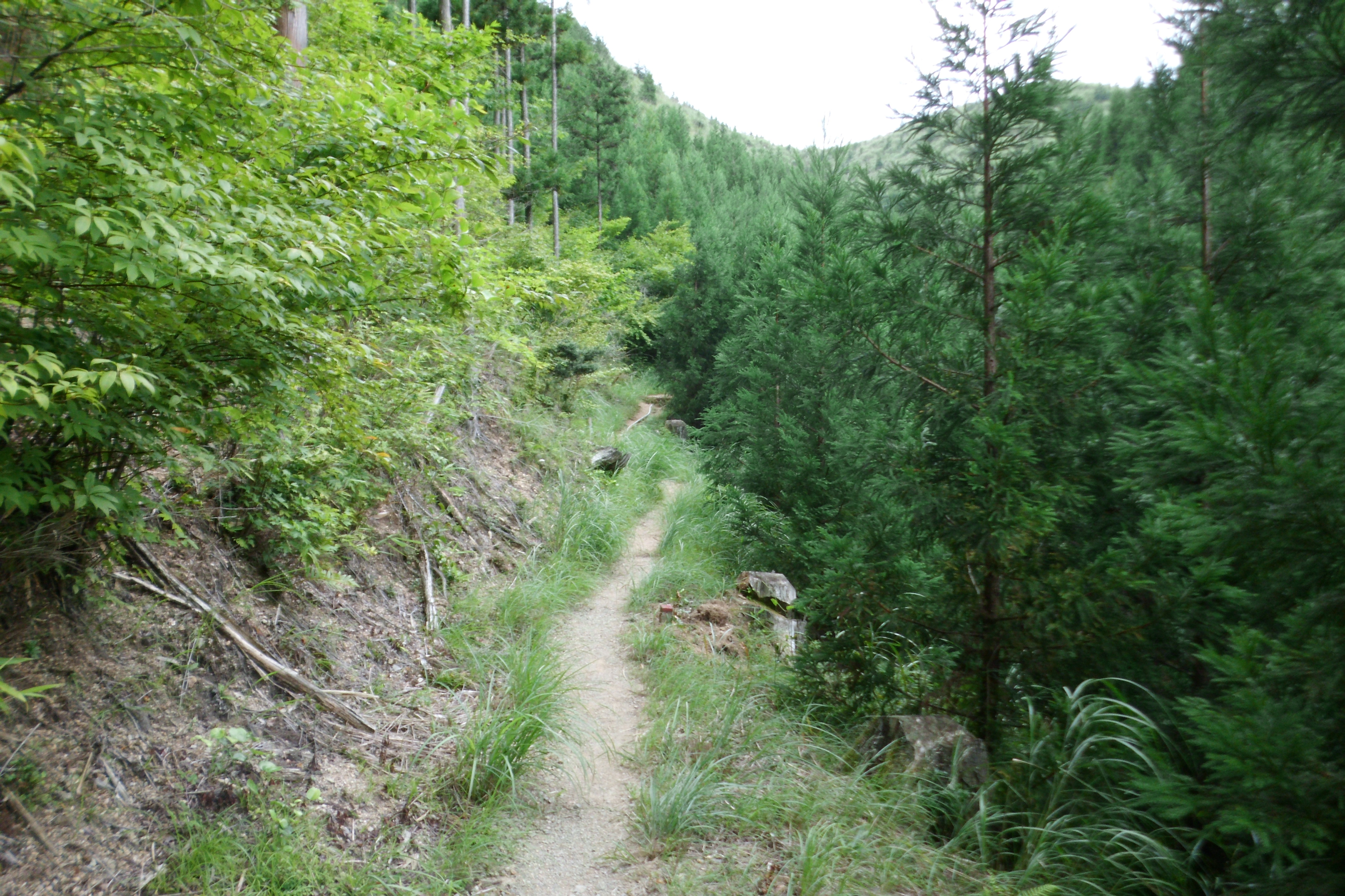 2016年に世界遺産「紀伊山地の霊場と参詣道」に「高野参詣道」として追加登録された女人道（にょにんみち）